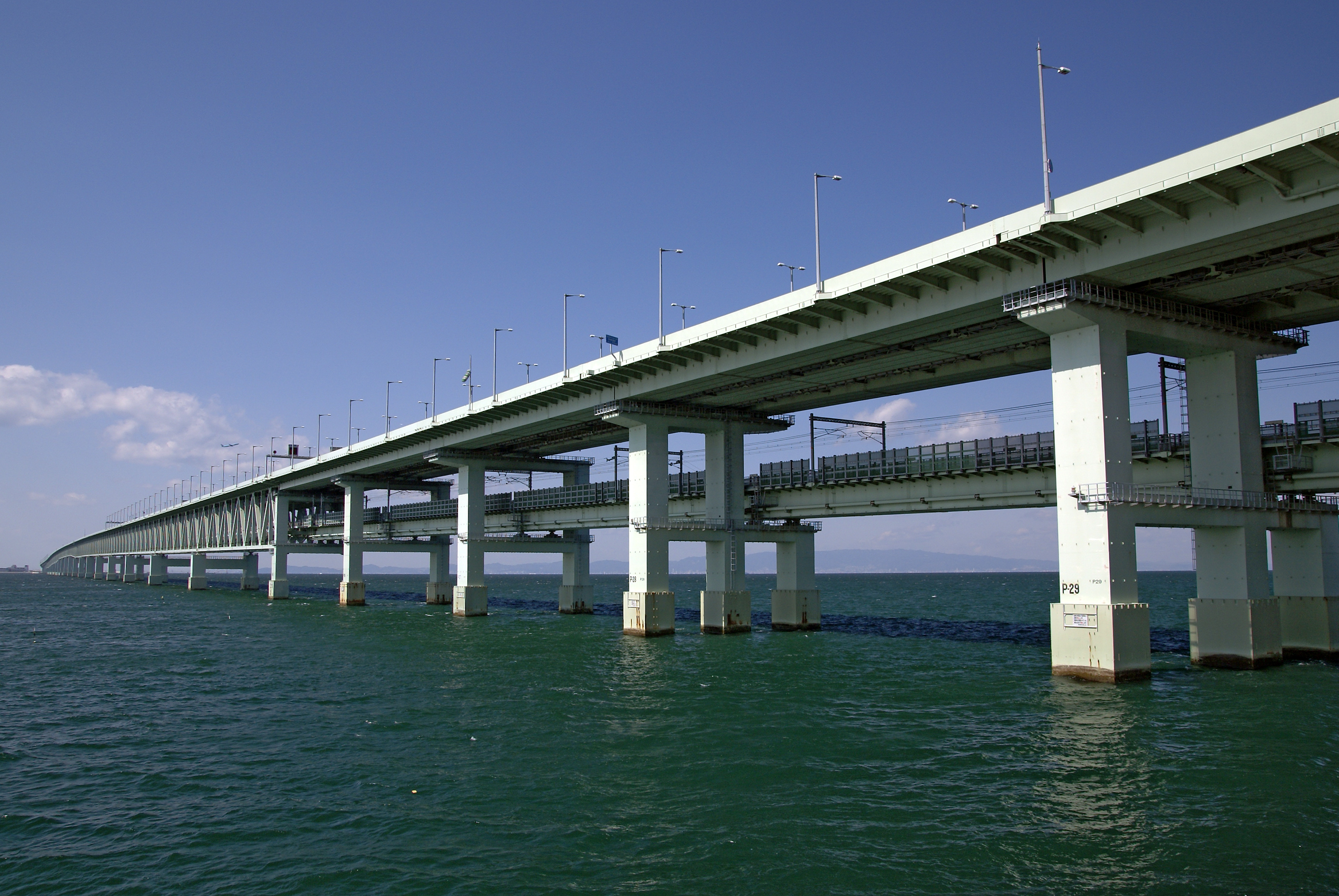 Sky Gate Bridge-R in Izumisano, Osaka Japan